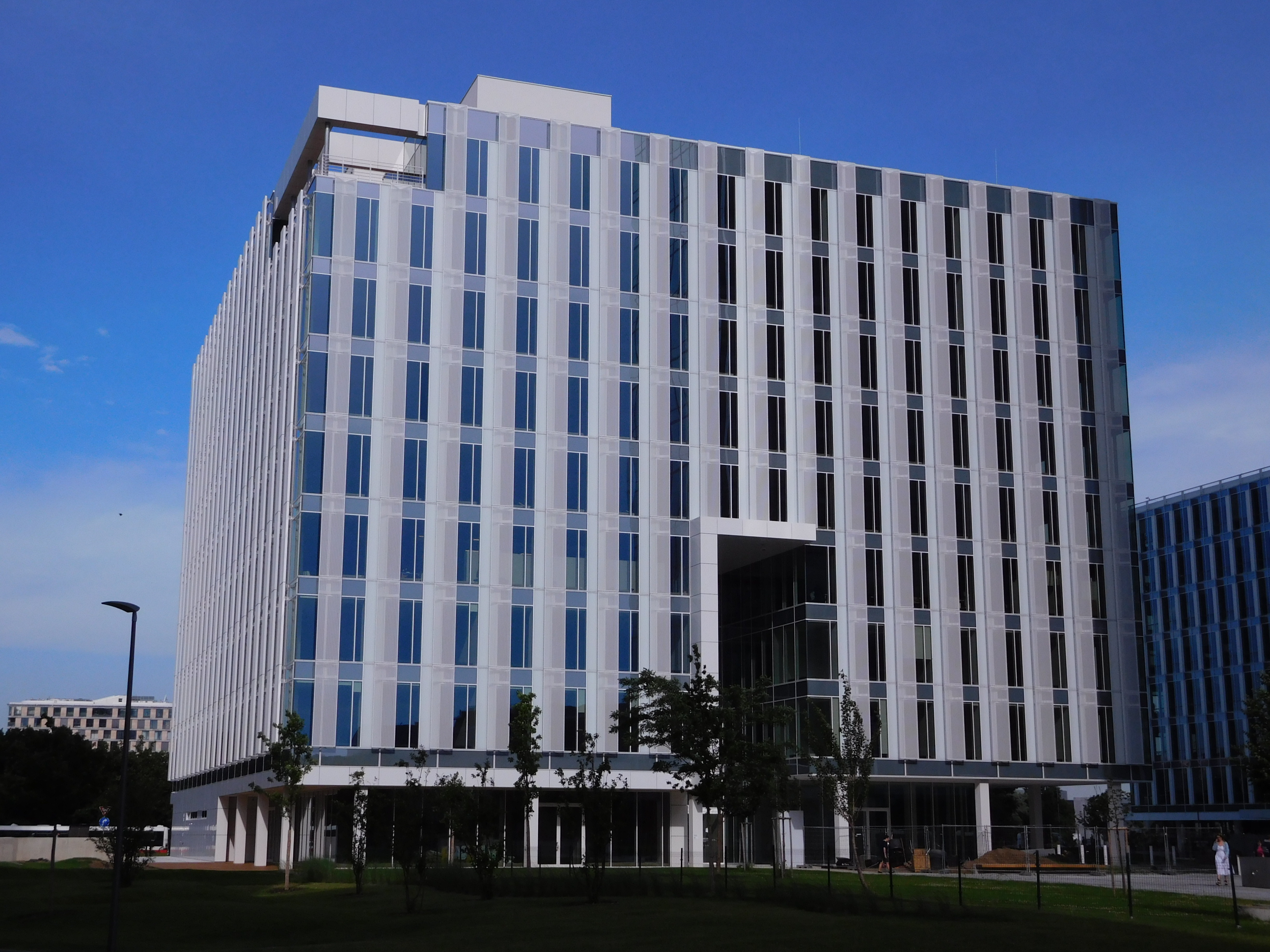 Praha - Pankrác, stavba Parkview